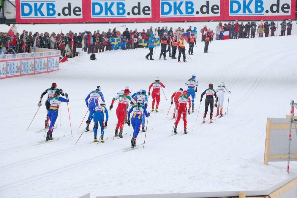 MS 2009 Liberec - ženská štafeta 4x5km